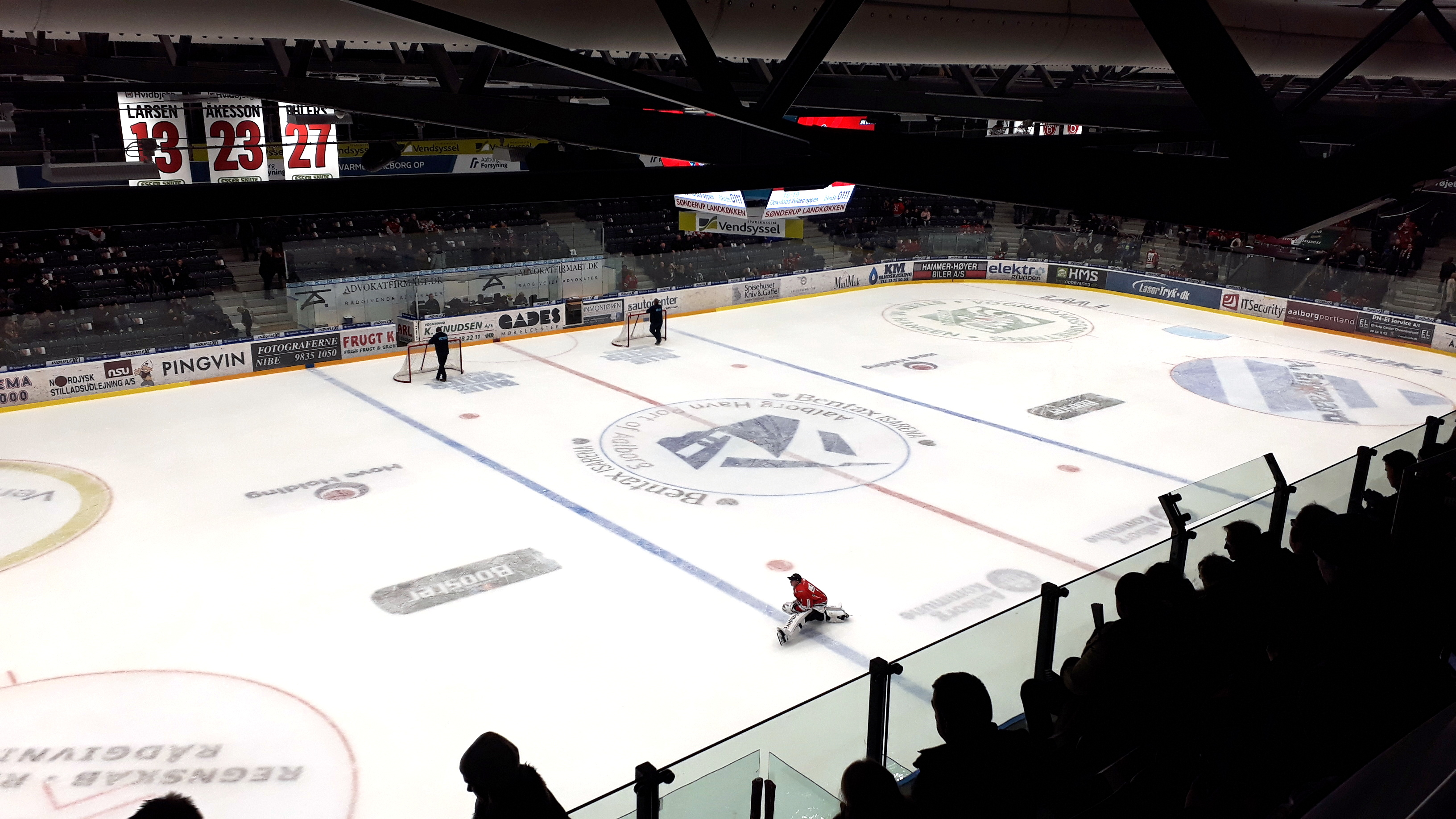 Ishockeyhallen Gigantium i Aalborg